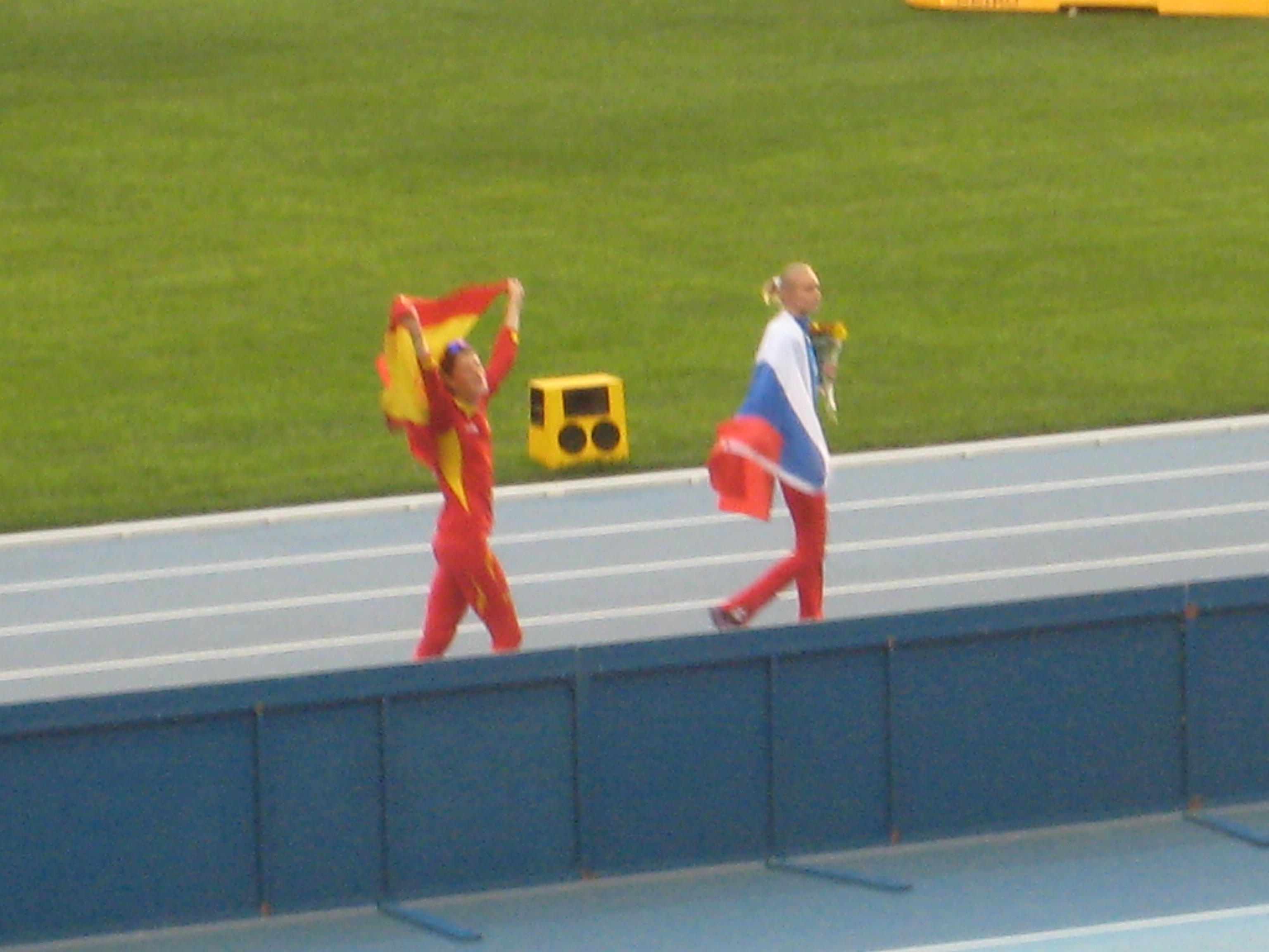 Чемпионат мира по лёгкой атлетике 2013. Чемпионка мира Светлана Школина (Россия) и бронзовый призёр Рут Бейтиа (Испания) проходят круг почёта после завершения соревнований в прыжке в высоту.